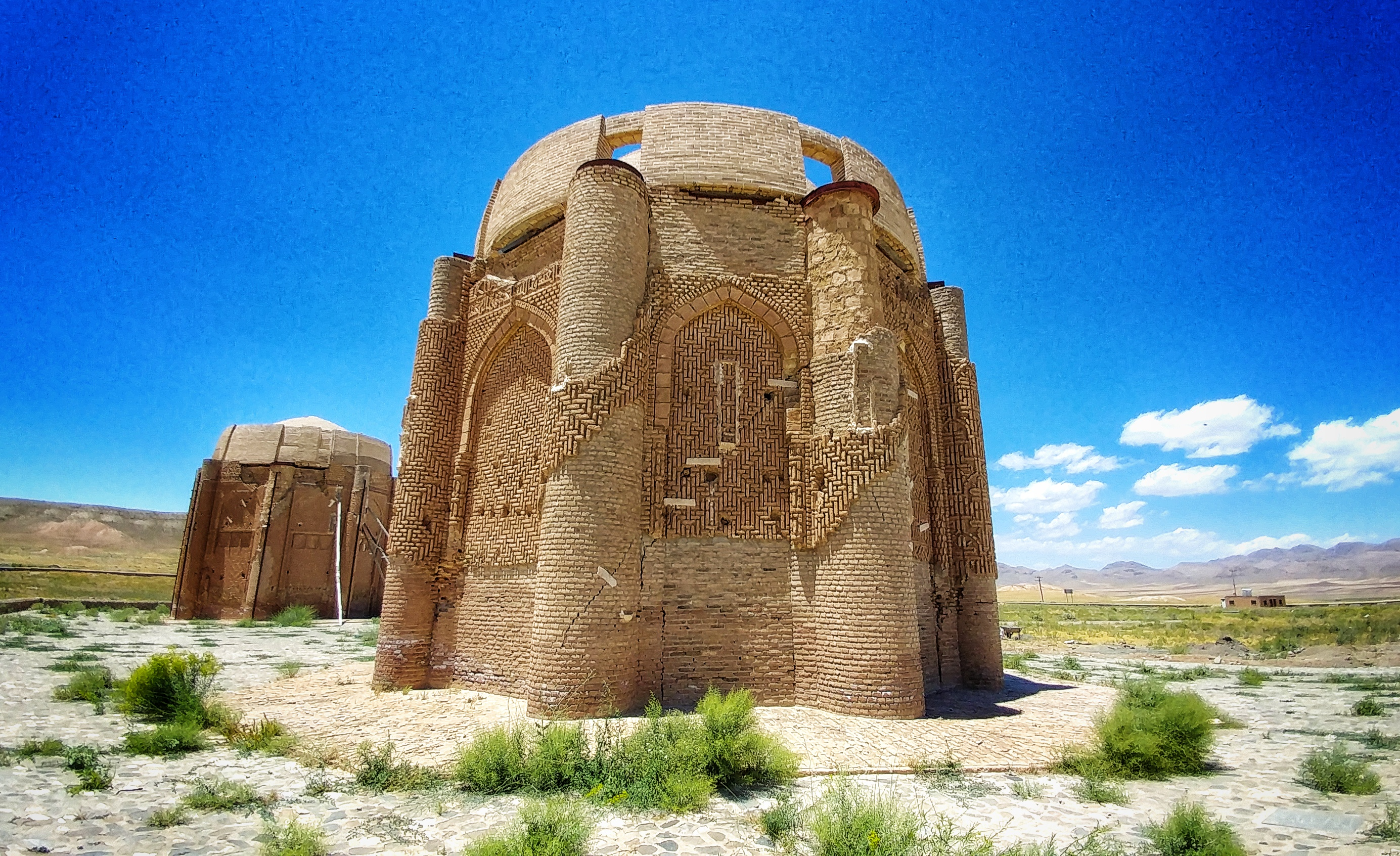 برج شرقی یا قدیمتر خرقان